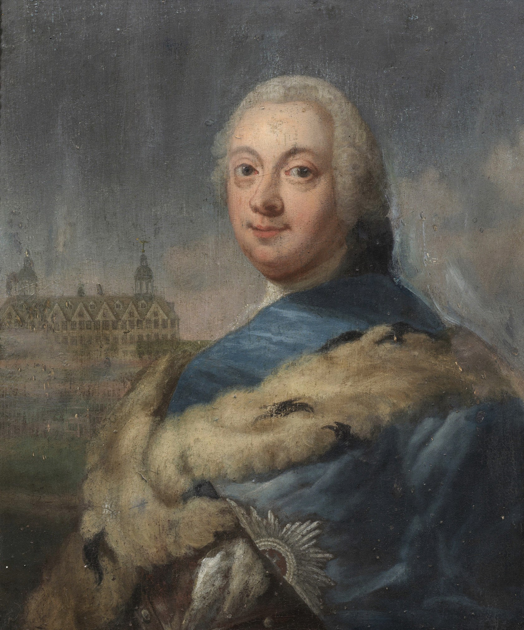 Portrait des Friedrich Karl Herzog zu Schleswig-Holstein-Sonderburg-Plön (1706-1761) in höfischer Tracht mit pelzverbrämten Fürstenmantel, im Hintergrund das Plöner Schloss.